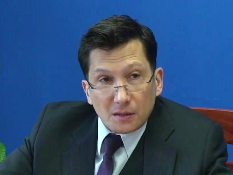 Zbigniew Kozak, inżynier i polityk.